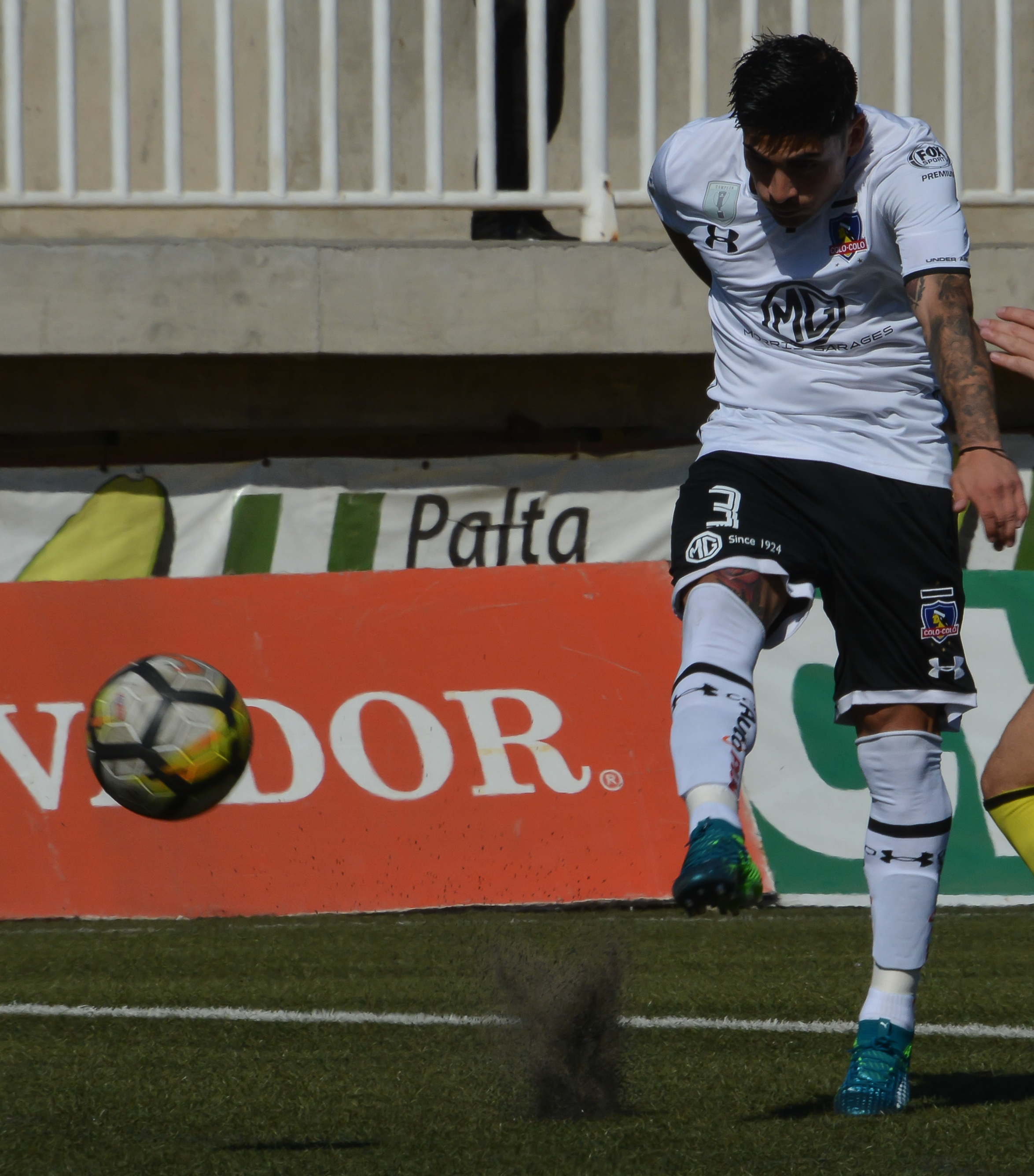 San Luis v Colo-Colo, Estadio Municipal Lucio Fariña Fernández, Quillota, Chile.